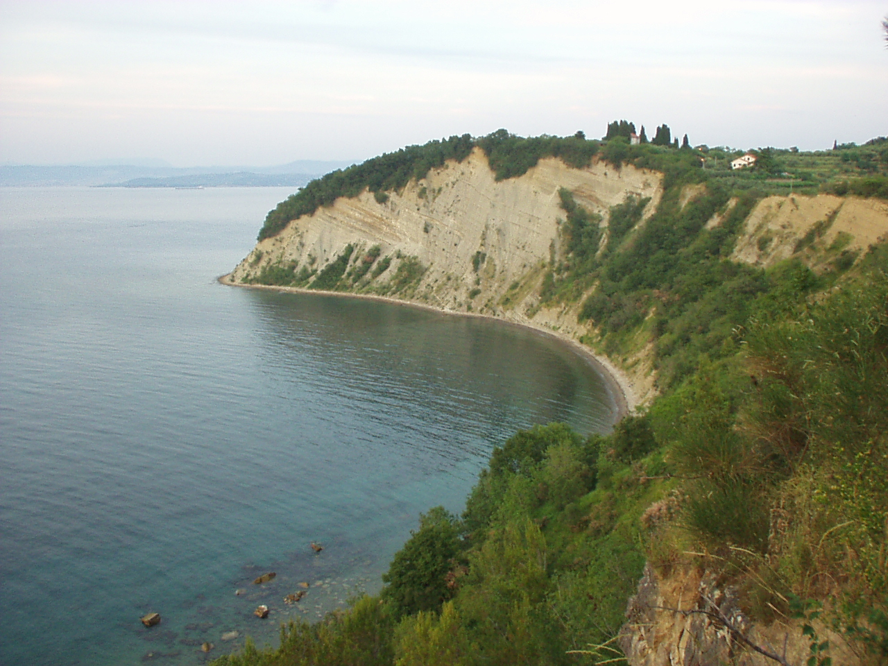 Strunjan, Mesecev zaliv. Primoz Peterlin, julij 2006